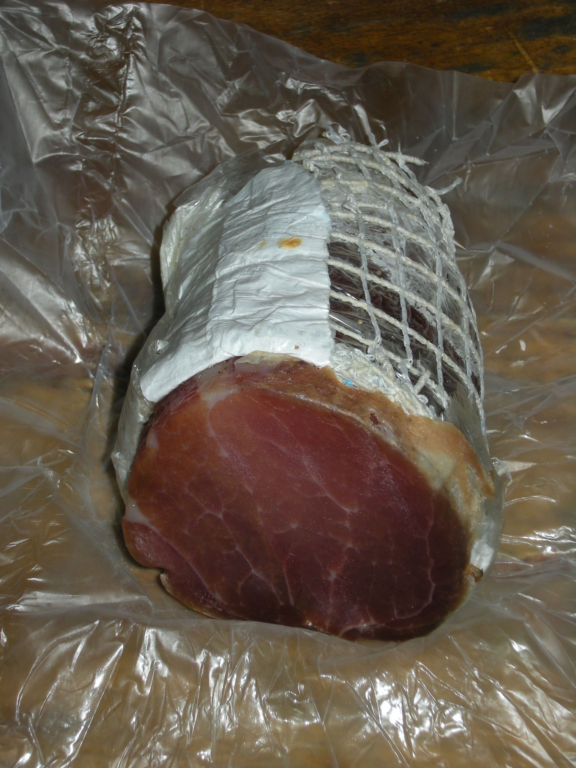 Naughty boy ahr